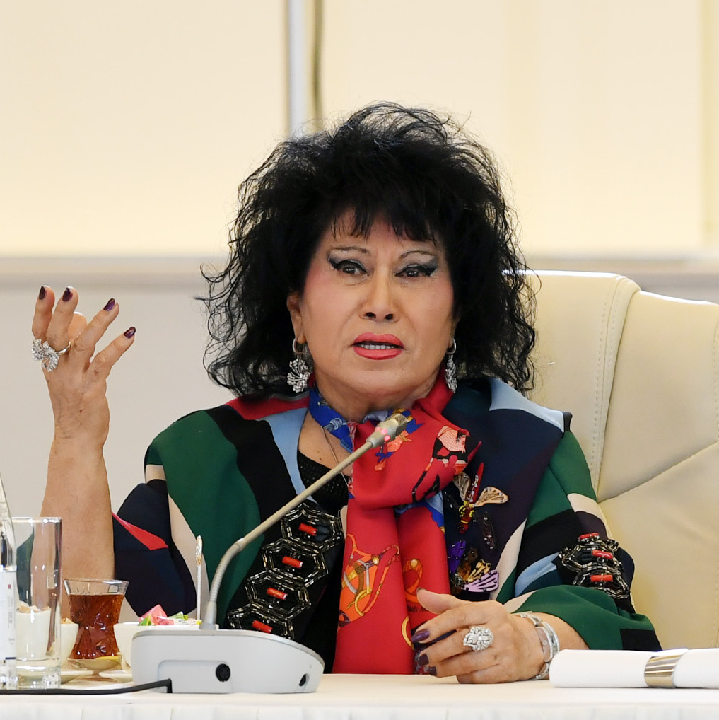 Azərbaycanın mədəniyyət və incəsənət xadimlərinin bir qrupunun Azərbaycan Respublikasının Prezidenti İlham Əliyev və birinci xanım Mehriban Əliyeva ilə görüşündə şəkilmiş foto